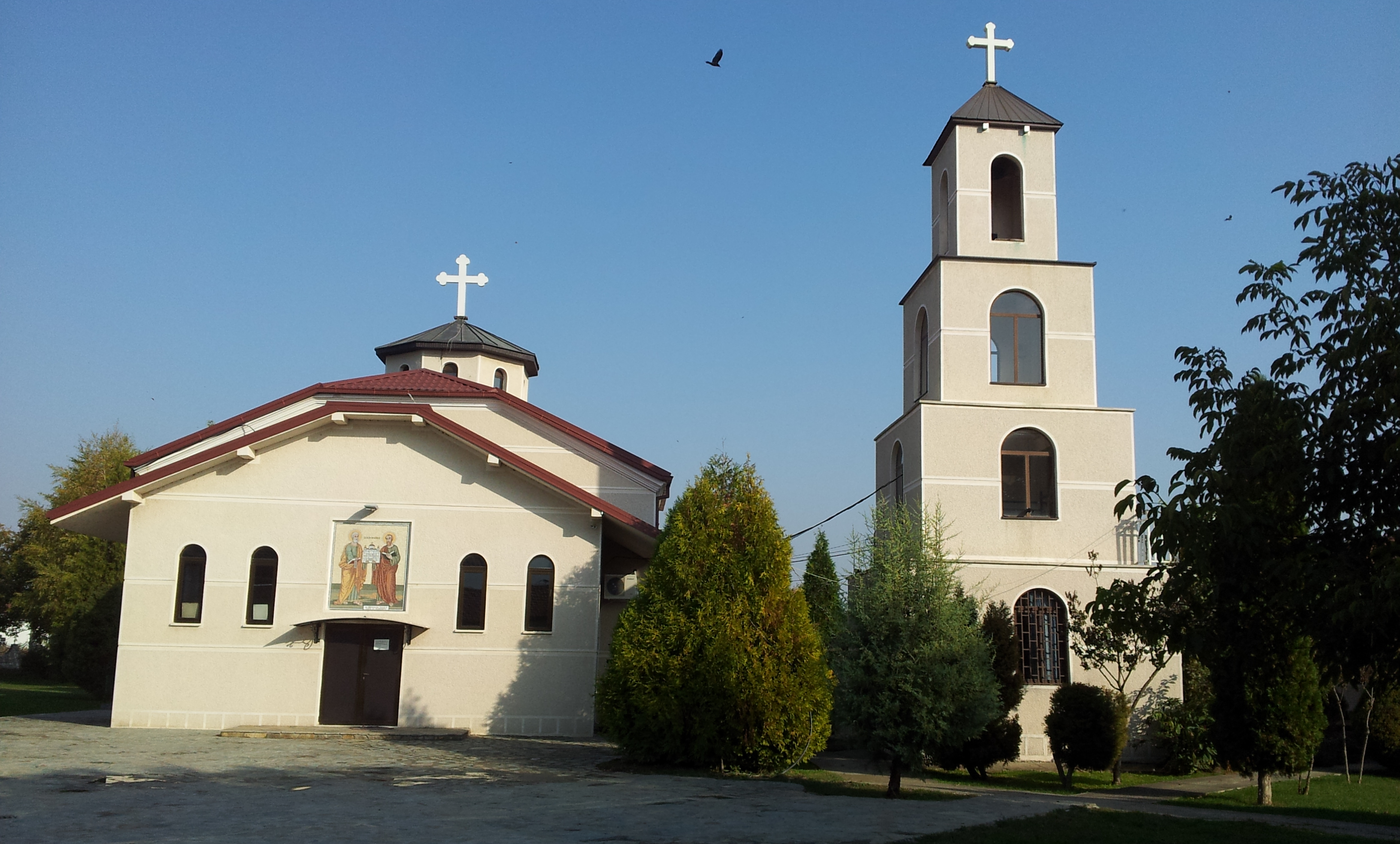 Црквата „Св. Апостоли Петар и Павле“ во село Горно Лисиче, Скопско заедно со камбанаријата